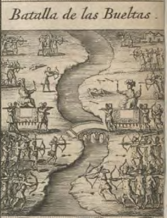 Batalla de Chocontá. Grabado en la "Historia general de las conquistas del Nuevo Reino de Granada" (Amberes, Juan Baptista Verdussen, 1688), de Lucas Fernández de Piedrahita.